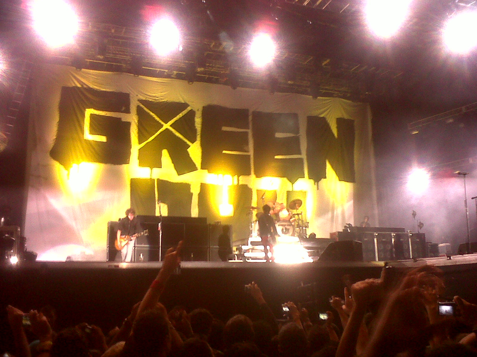 Green Day en Caracas - Venezuela. 08/10/2010